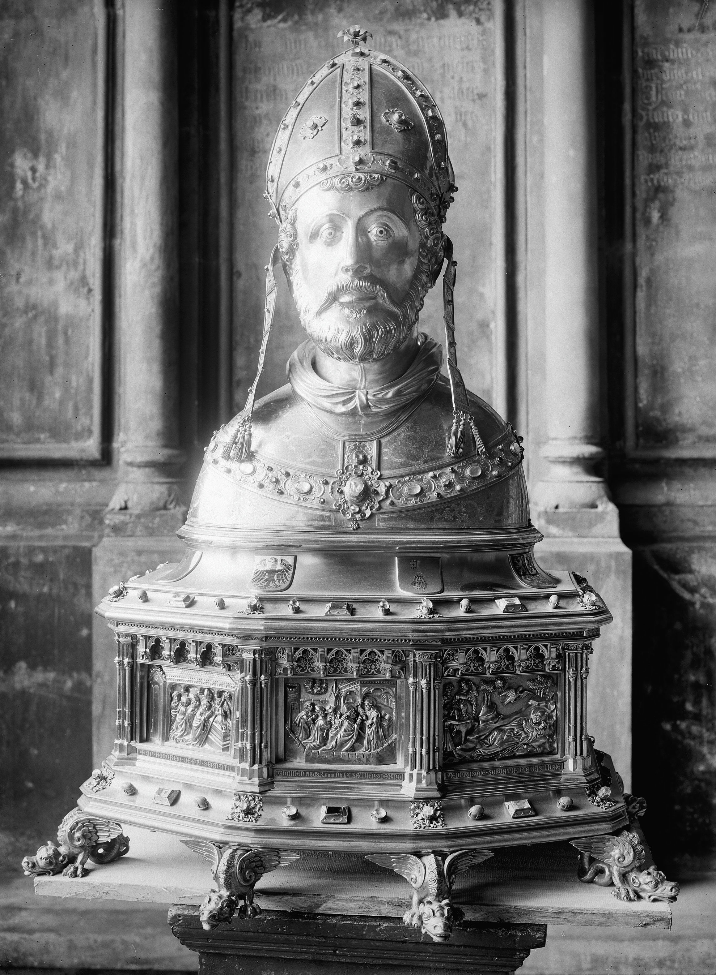 Sint-Servaaskerk (Bergportaal): Reliekbuste van Sint-Servaas, van voren.